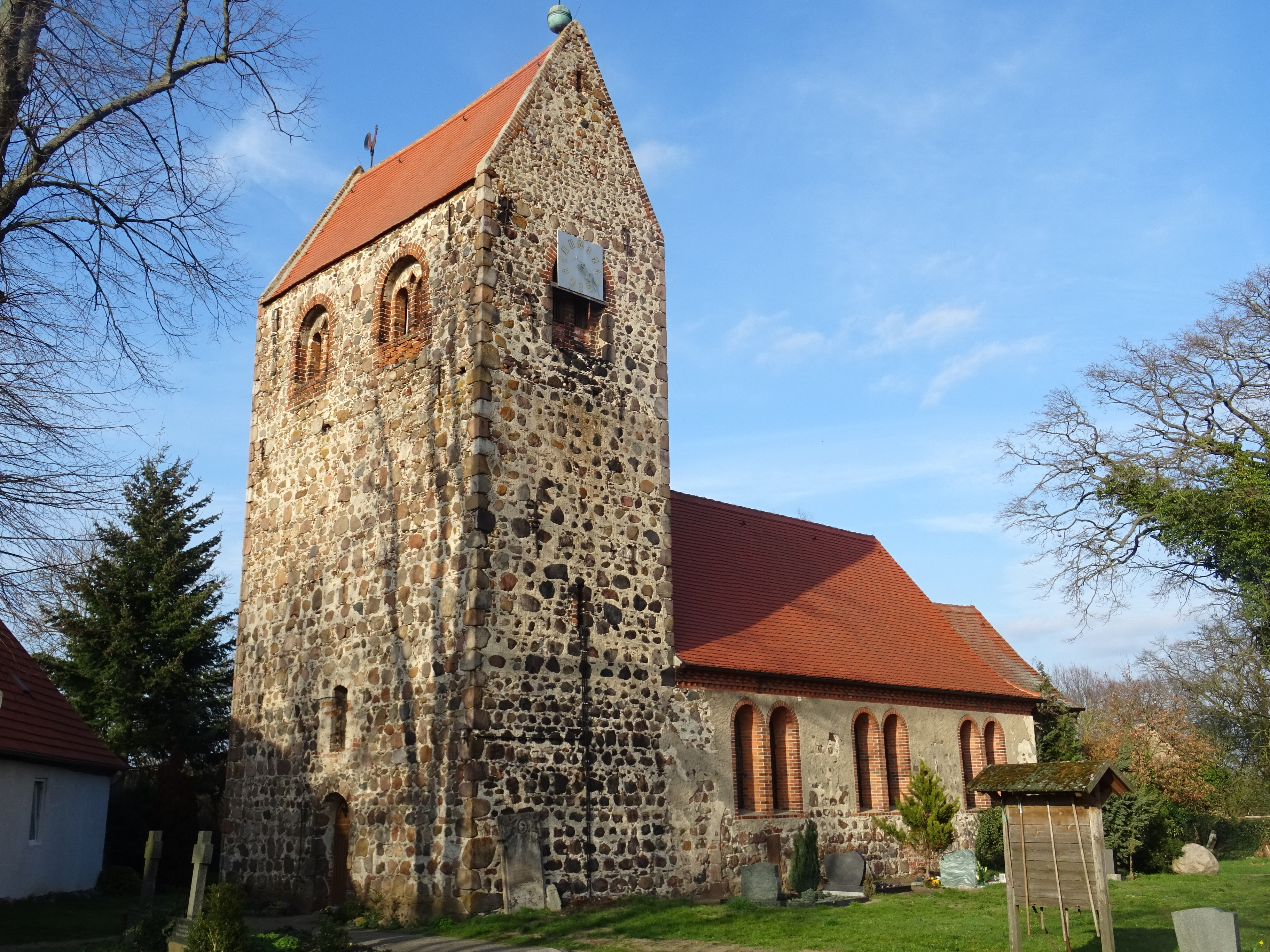 Walsleben, Ortsteil von Osterburg (Altmark), Kirche, Blick von Südwesten